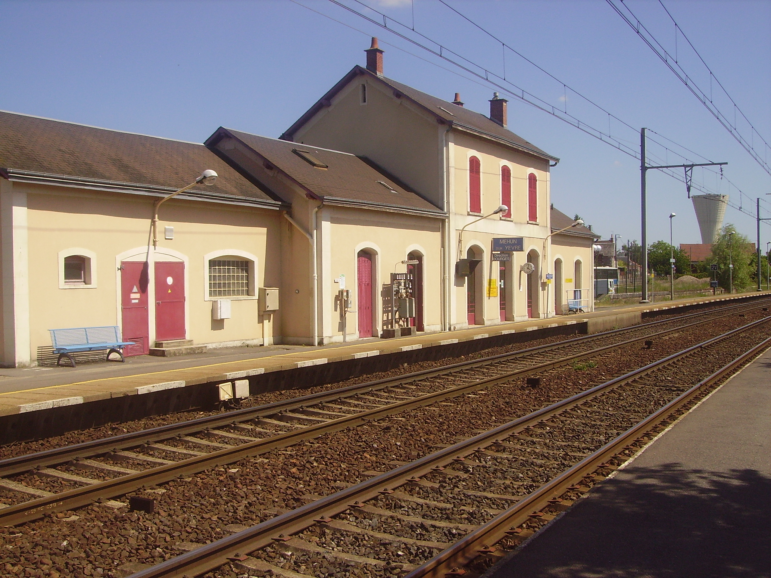 Gare de Mehun-sur-Yèvre (Cher)